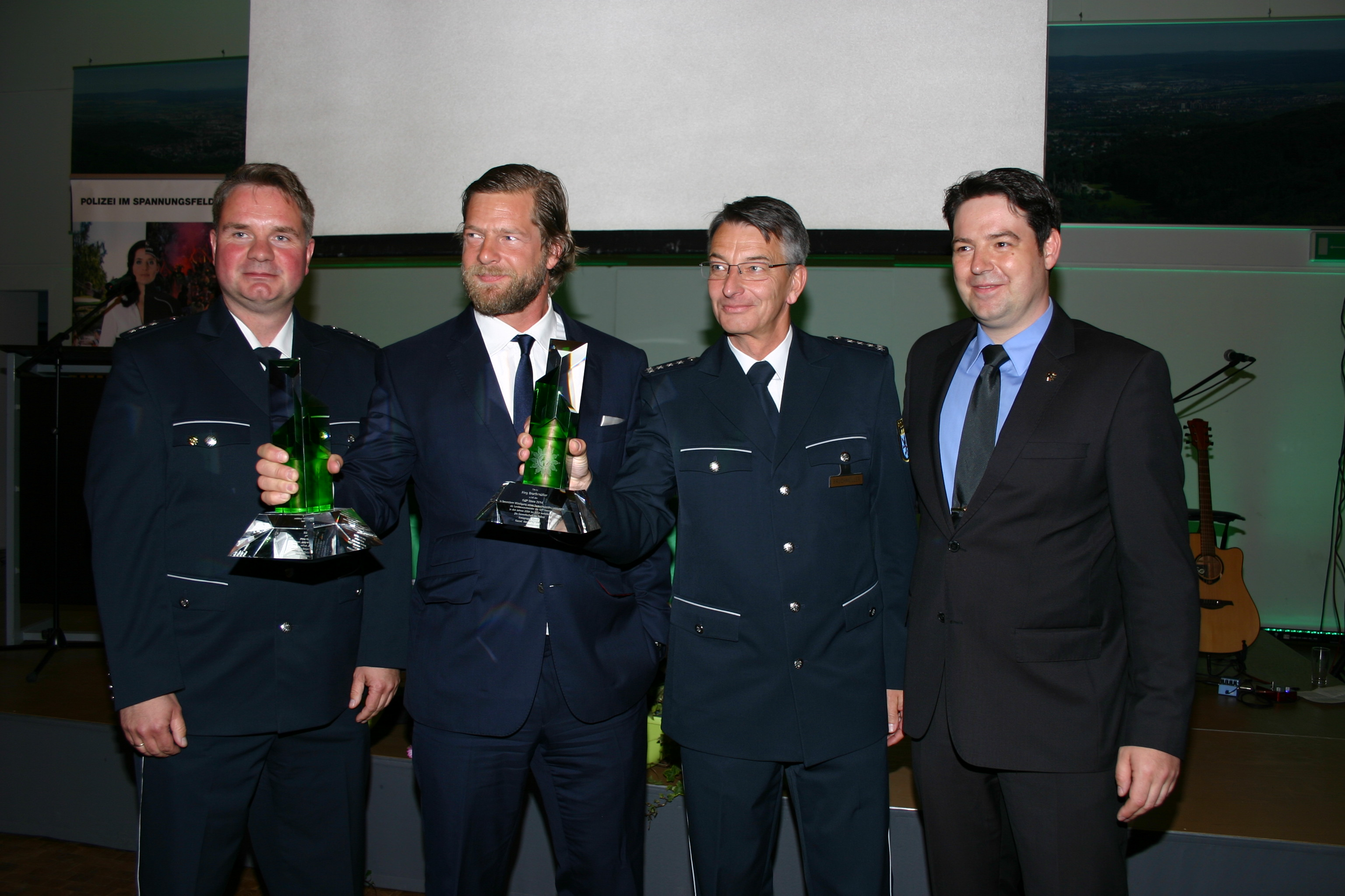 Stefan Rüppel (Bezirksgruppenvorsitzender GdP-Nordhessen) und Lars Elsebach (Vorsitzender GdP-Kreisgruppe) mit der neu gestalteten Glasskulptur. Henning Baum war der erste Preisträger des neugestalteten Preises. Jörg Bruchmüller ( Vorsitzenden der Gewerkschaft der Polizei (GdP) Hessen erhielt ihn ebenfalls. Foto: Simone Sauerländer